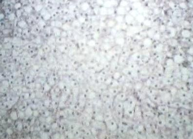 This image was copied from pt. The original description was: Fígado cirroso. By Angeloleithold/1975. Descrição Vista de células de um fígado cirroso. Fonte Angeloleithold, acervo particular/1975. Licença